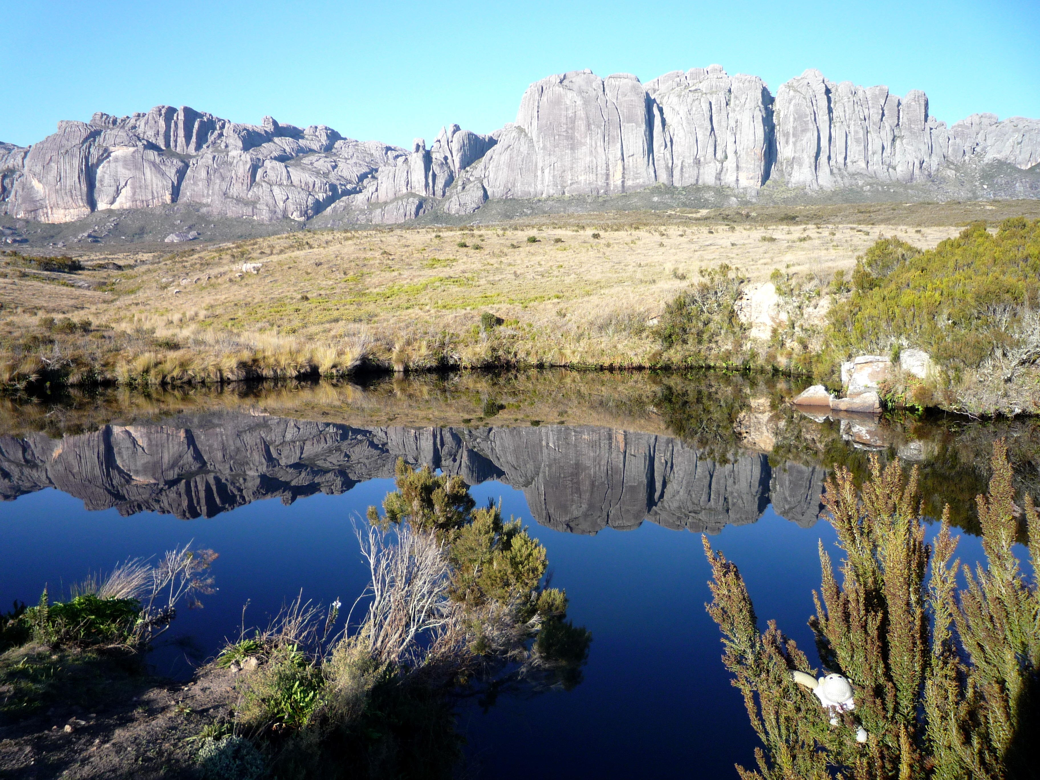 Andringitra National Park, Madagascar.